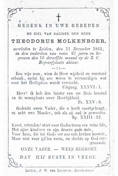 Bidprentje Th. Molkenboer